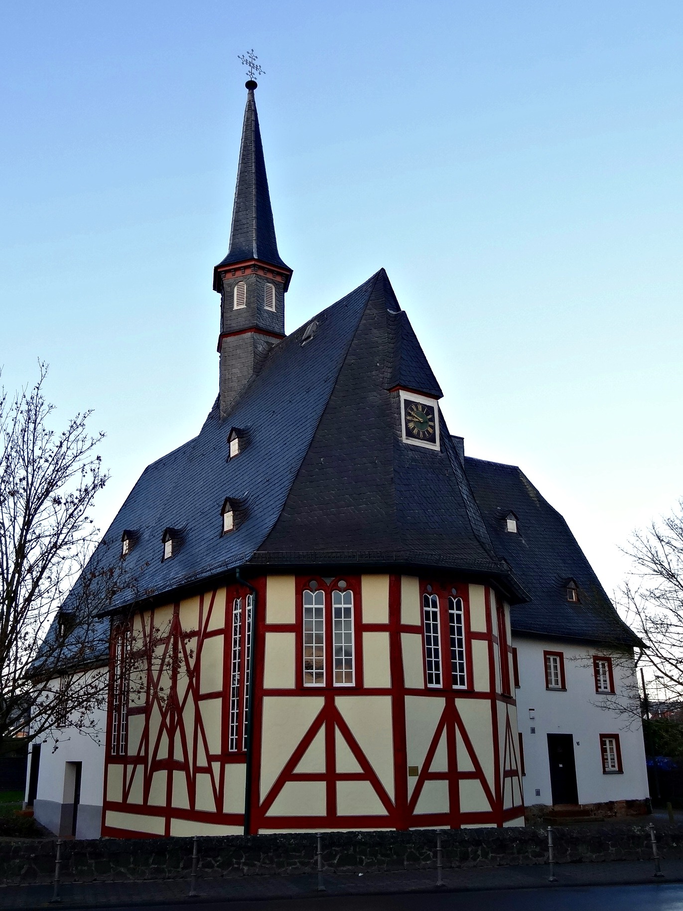 Ehemalige Hospitalkapelle St. Wendelin (Butzbach)